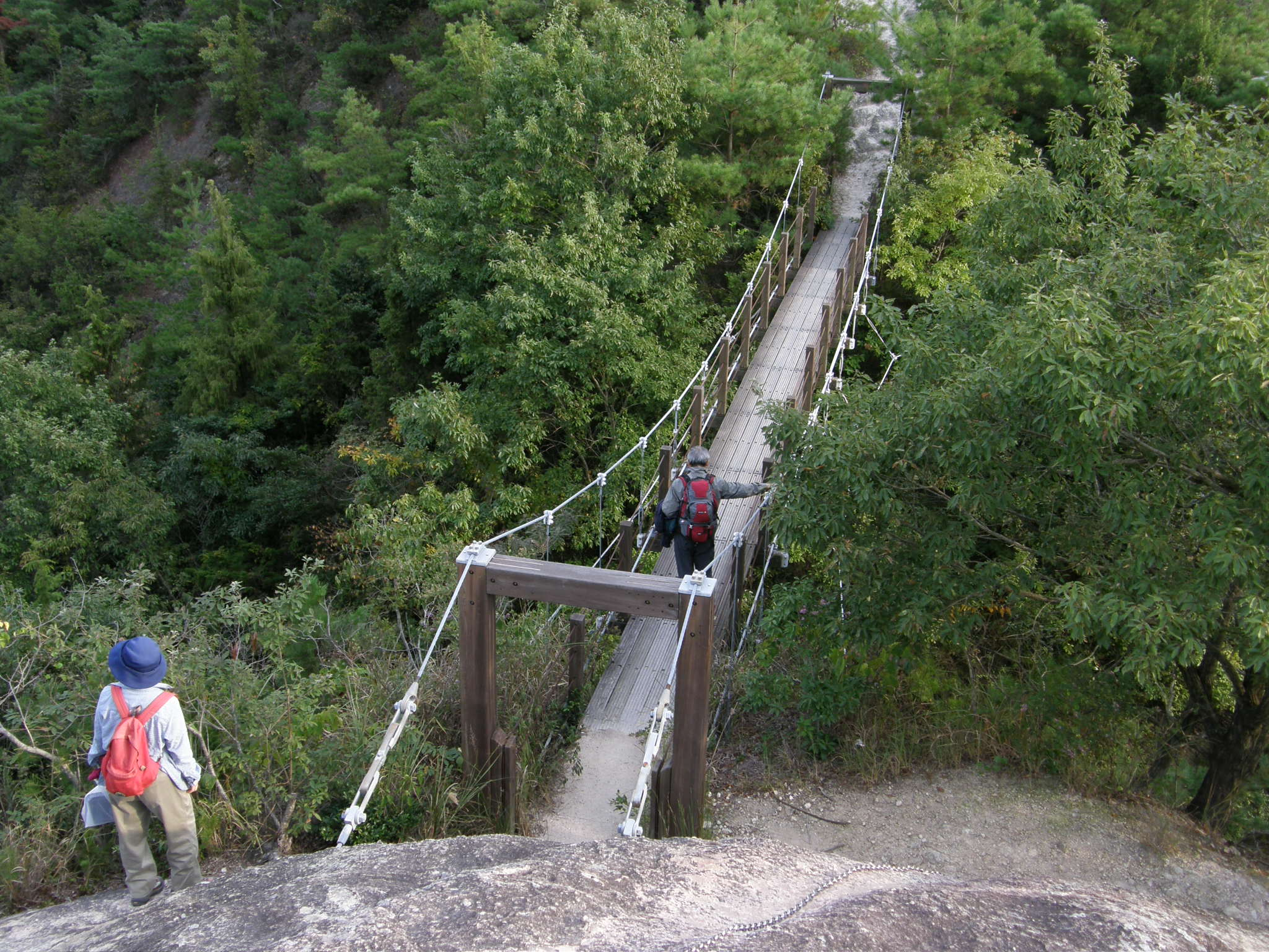 Kasai-Furubokke-nature park 古法華自然公園 加西市 吊橋 加西市